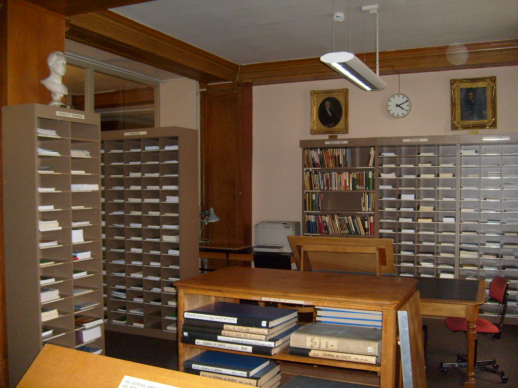 Salle de périodiques de la Bibliothèque de Genève (Suisse)